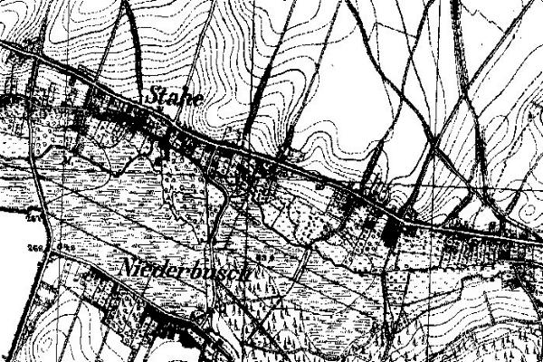 Neuaufnahme 1891-1912